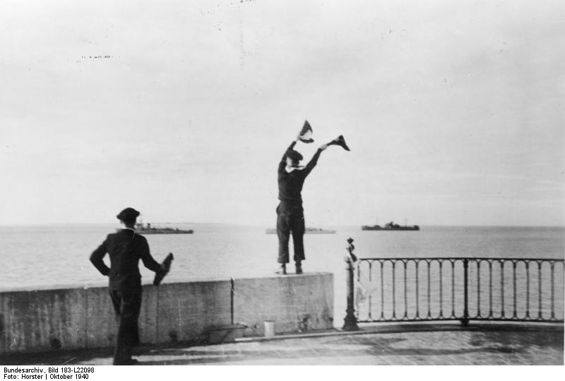 Von der Quaimauer des französischen Hafens Royan gibt der Marinesoldatr Flaggsignale an die auf der Reede liegenden deutschen Räumboote. Okt. 1940 PK-Horster-Scherl Bilderdienst